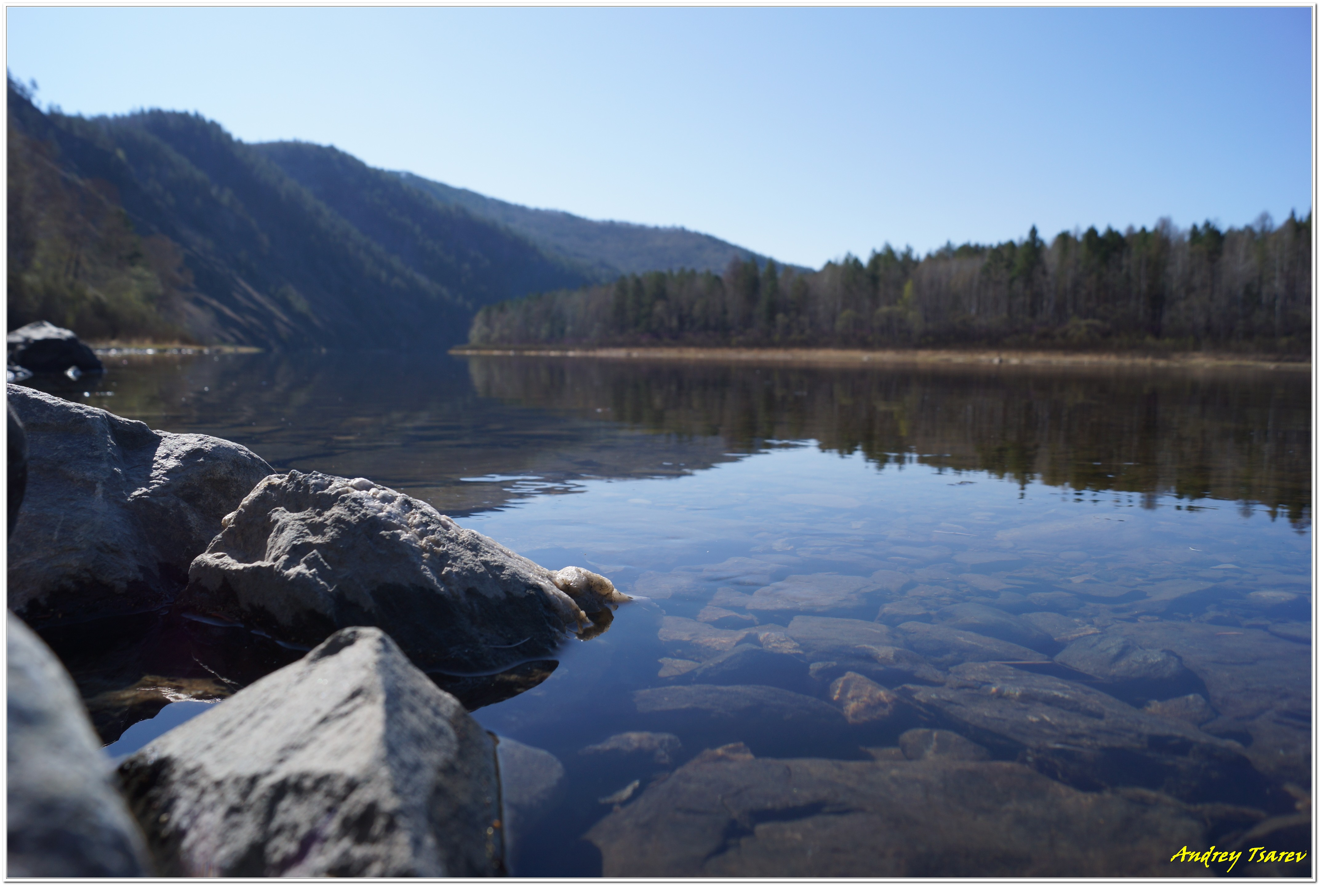 Чикой, Красночикойский район This image is related to the protected area of Russia number 7500081